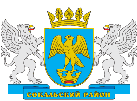 Герб Сокальського району